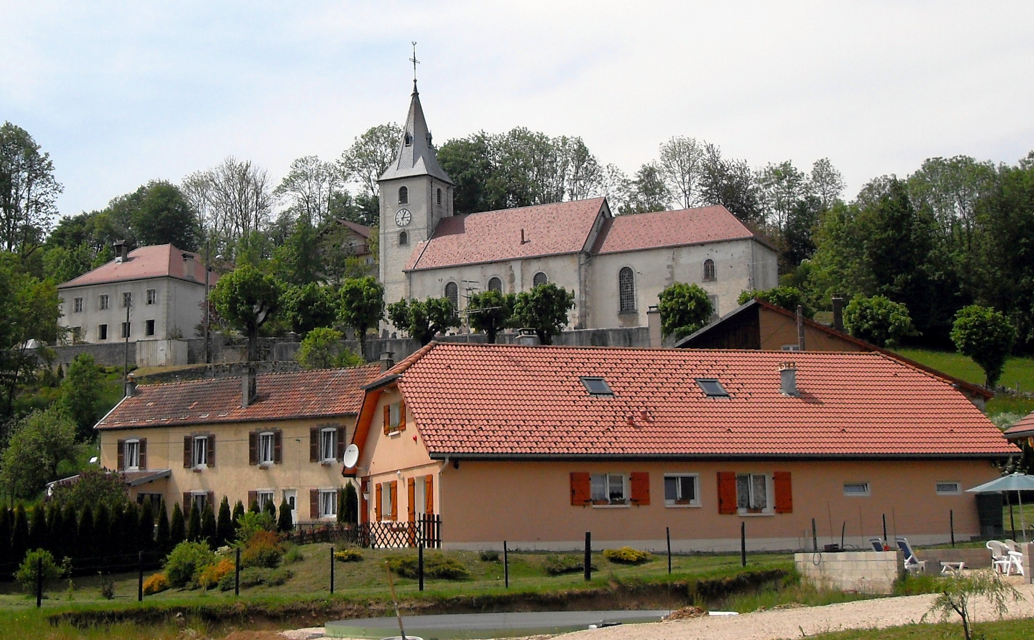 L'église Saint-Laurent à Courtefontaine